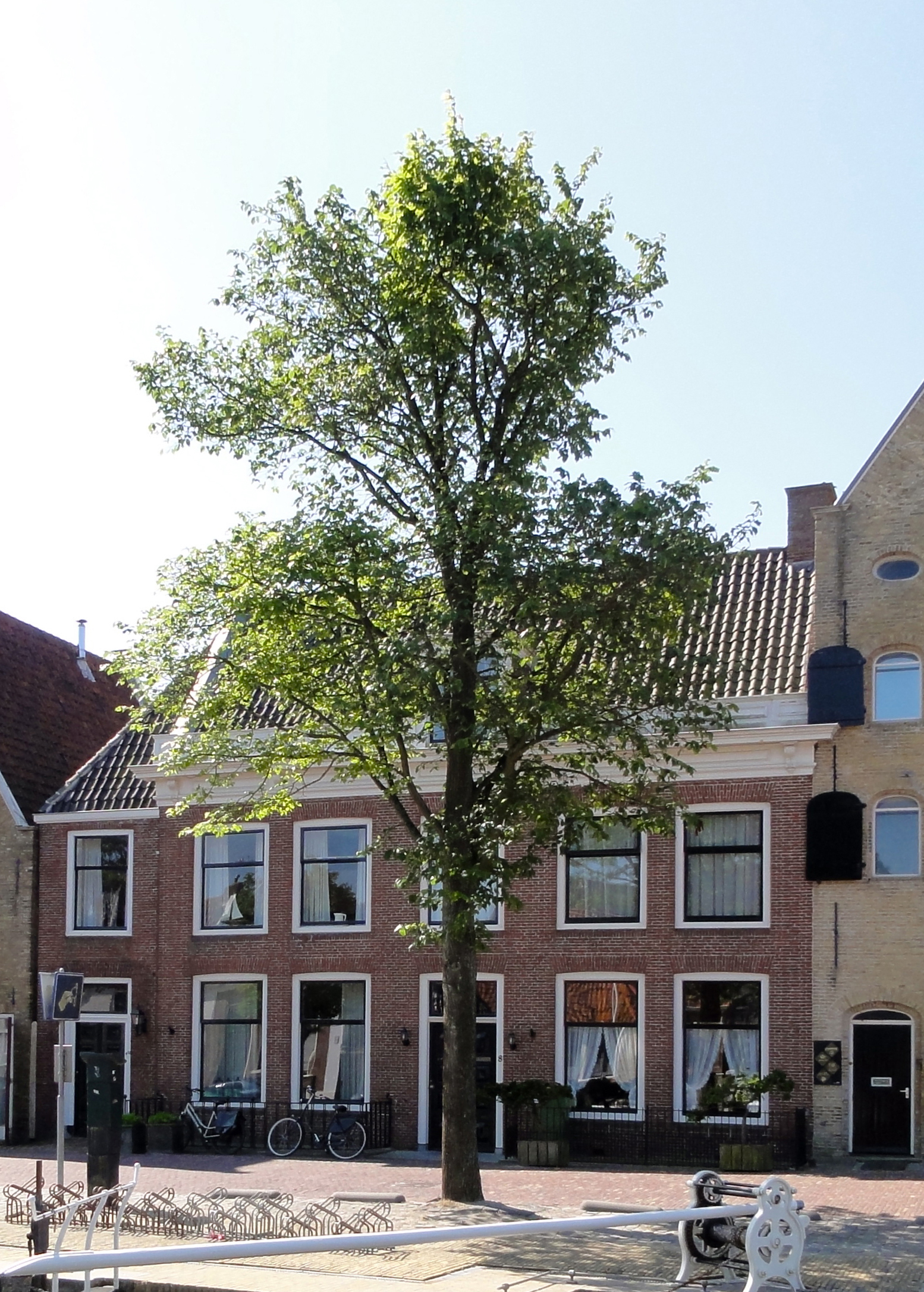 Rozengracht 8 (rechts) en 8a (links) in Harlingen